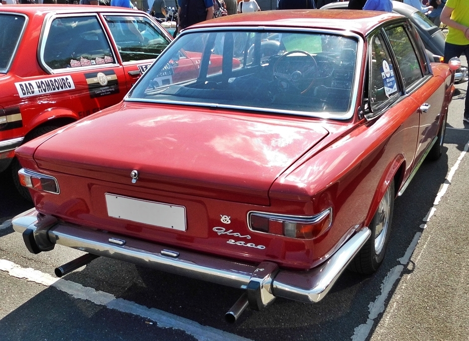 Oldtimer Berlin 2016